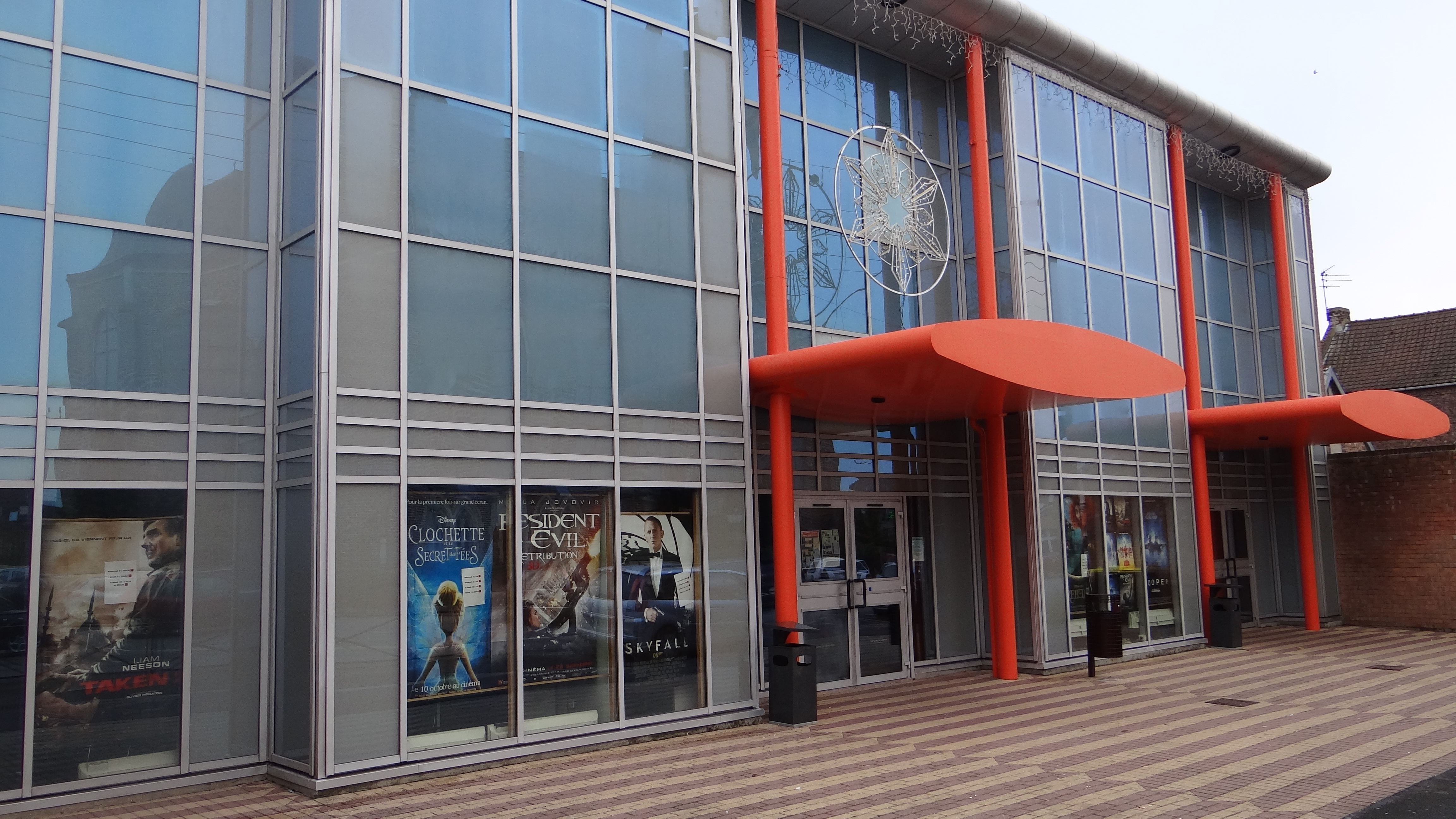 L'Idéal Cinéma-Jacques Tati - rénovation du cinéma et passage au numérique 3D - octobre 2012.